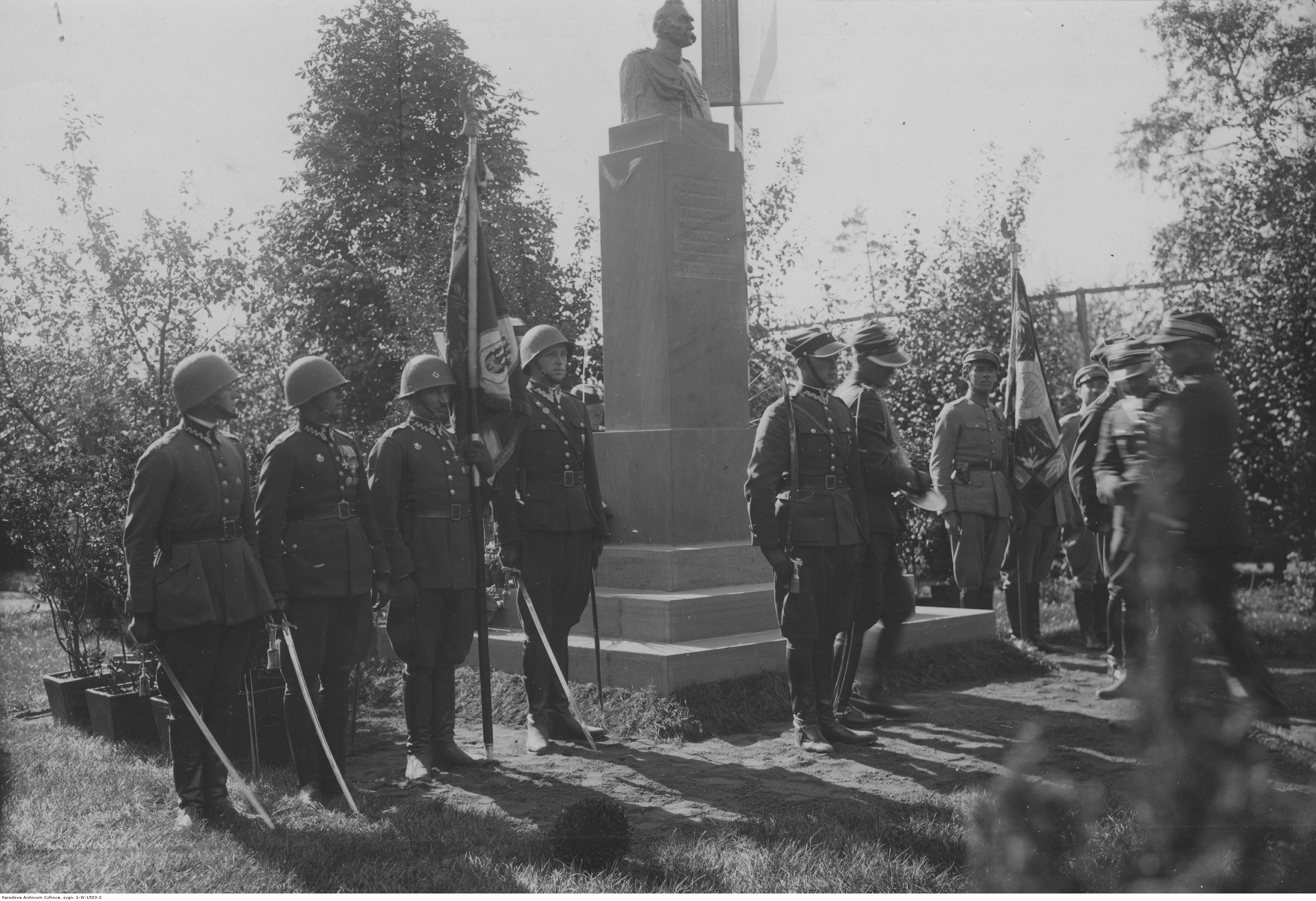 Święto 7 Pułku Artylerii Lekkiej w Częstochowie w październiku 1934 r. Uroczystość odsłonięcia pomnika Marszałka Józefa Piłsudskiego w koszarach 7 pal-u w Częstochowie. Warta honorowa przy pomniku. Widoczny poczet sztandarowy ze sztandarem pułku. Koncern Ilustrowany Kurier Codzienny - Archiwum Ilustracji. Sygnatura: 1-W-1503-2